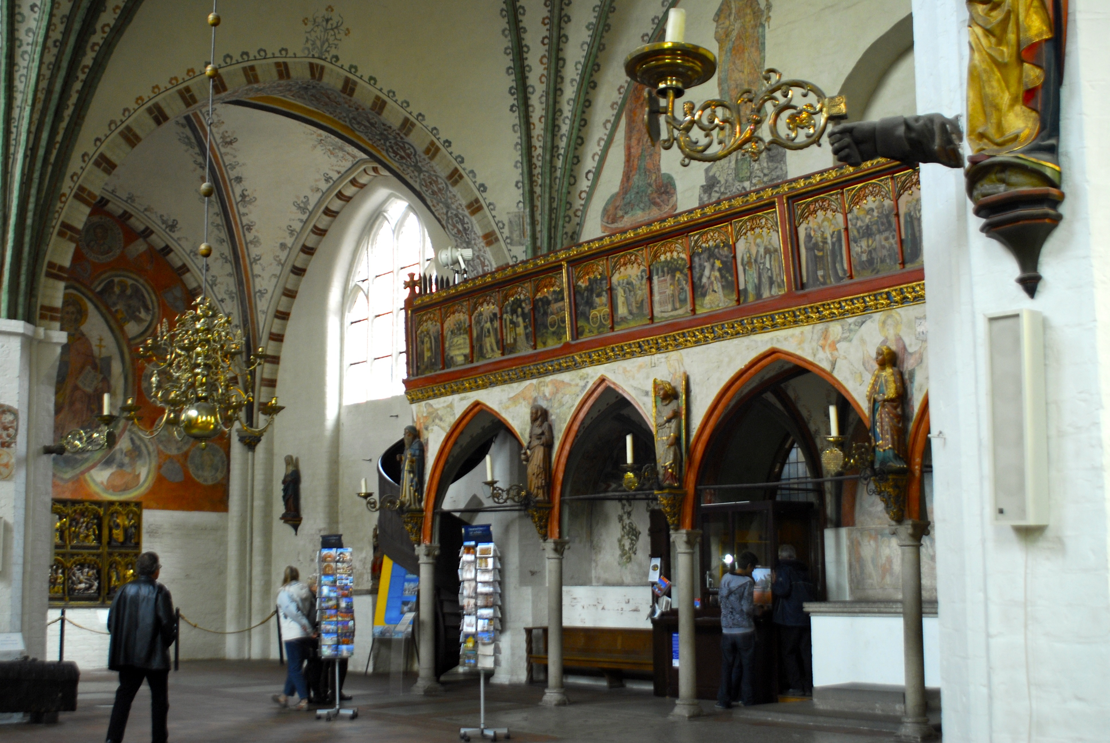 Lübeck wurde um 1000 nChr als slawische Siedlung an der Trave gegründet. Graf Adolf II von Schauenburg gründet 1143 eine Kaufmannssiedlung auf dem Platz der zuvor zerstörten slavischenSiedlung. Nachdem diese 1157 durch Feuer wiederum zerstört wurde wird Lübeck 1159 von Heinrich dem Löwen neu gegründet. 1160 dann erhielt Lübeck das Soester Stadtrecht und ein Jahr später das Artlenburger Privileg. Damit war die Stadt den gotländischen Kaufleuten gleich gestellt und konnte Handel treiben. Von Kaiser Friedrich II erhielt die Stadt 1226 den Reichsfreibrief und wurde damit reichsunmittelbare Stadt. Lübeck ist die zweitgrößte Stadt Schleswig-Holsteins und ist flächenmäßig die größte Stadt. Die Altstadt gehört zum UNESCO Kulturerbe.